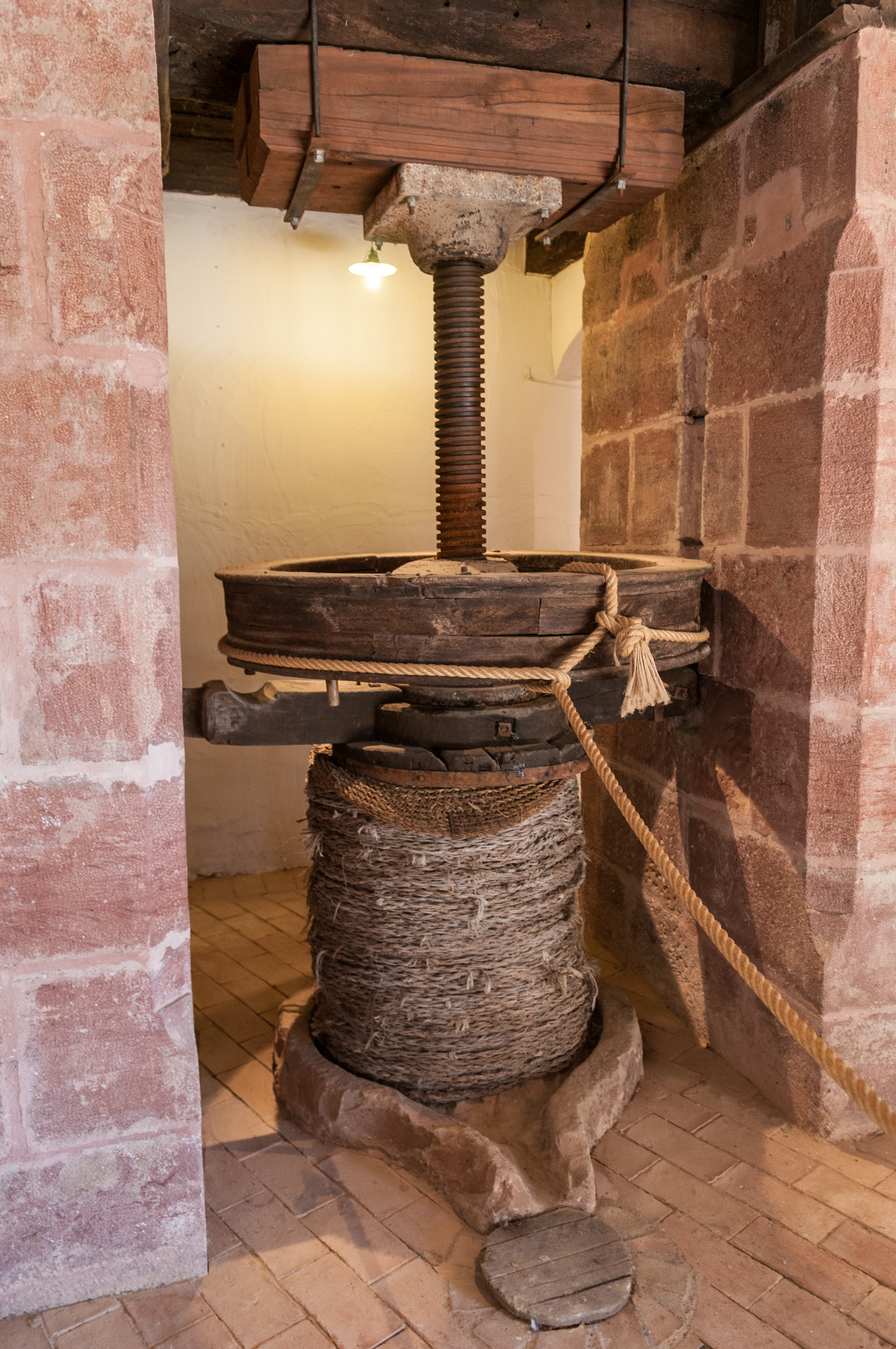 Olive oil museum in La Laguna